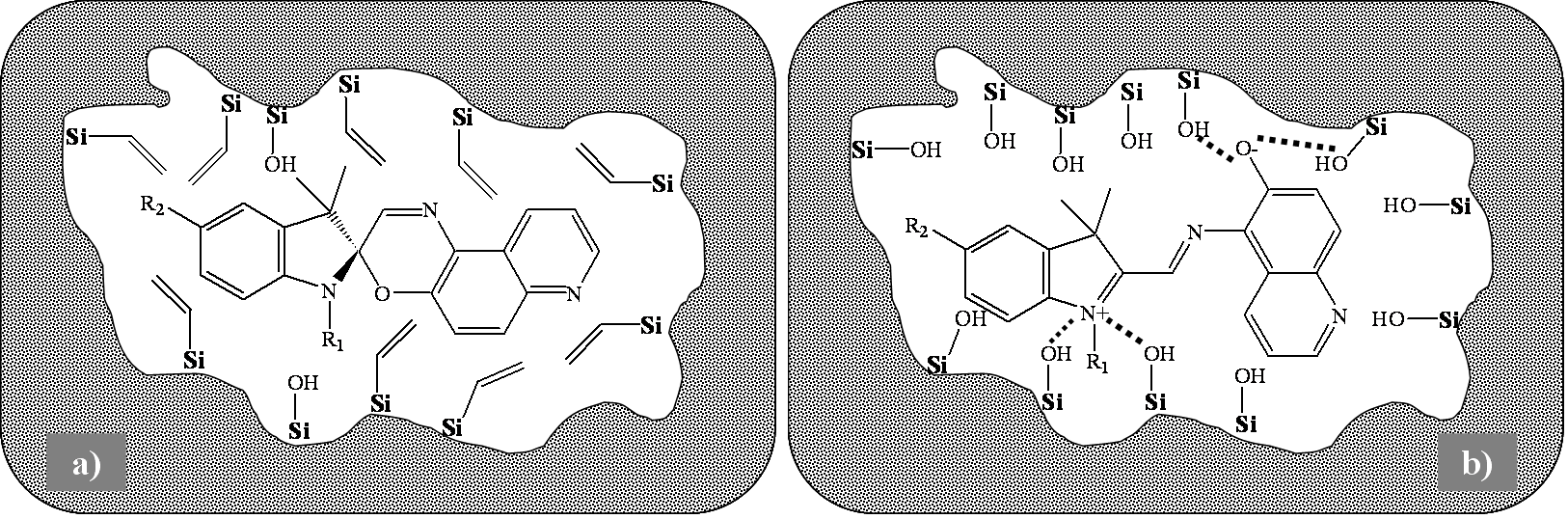 Effet de l’environnement sur la stabilité relative de chacune des formes d’une molécule photochromique. a) Matrice hybride préparée à partir de vinyltriéthoxysilane ; b) Matrice inorganique préparée à partir de tétraéthoxysilane. Auteur : Frédéric Chaput, réalisé avec un programme de dessin. Licence GFDL Frédéric Chaput